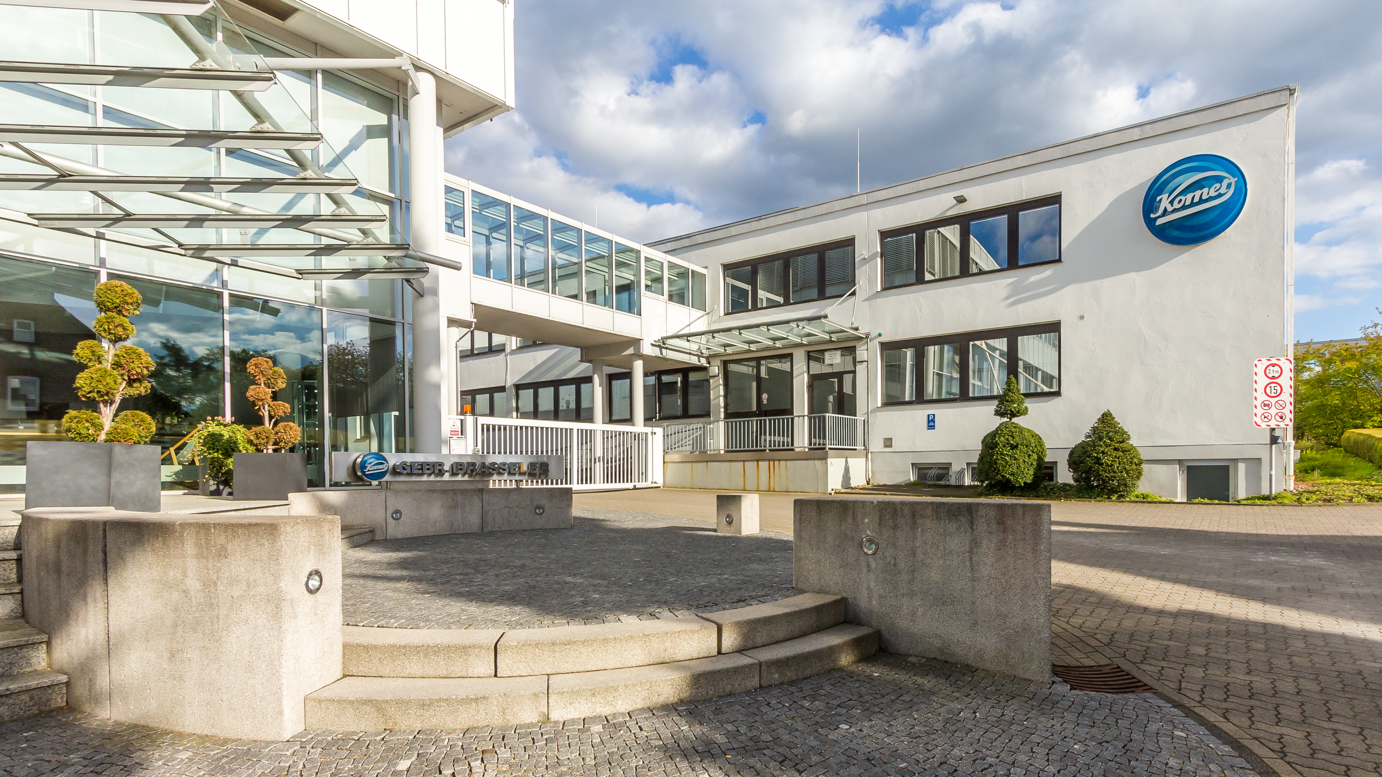 Gebr. Brasseler, Trophagener Weg 25, 32657 Lemgo. Am rechten Gebäude befindet sich das Logo des Markennamens „Komet“